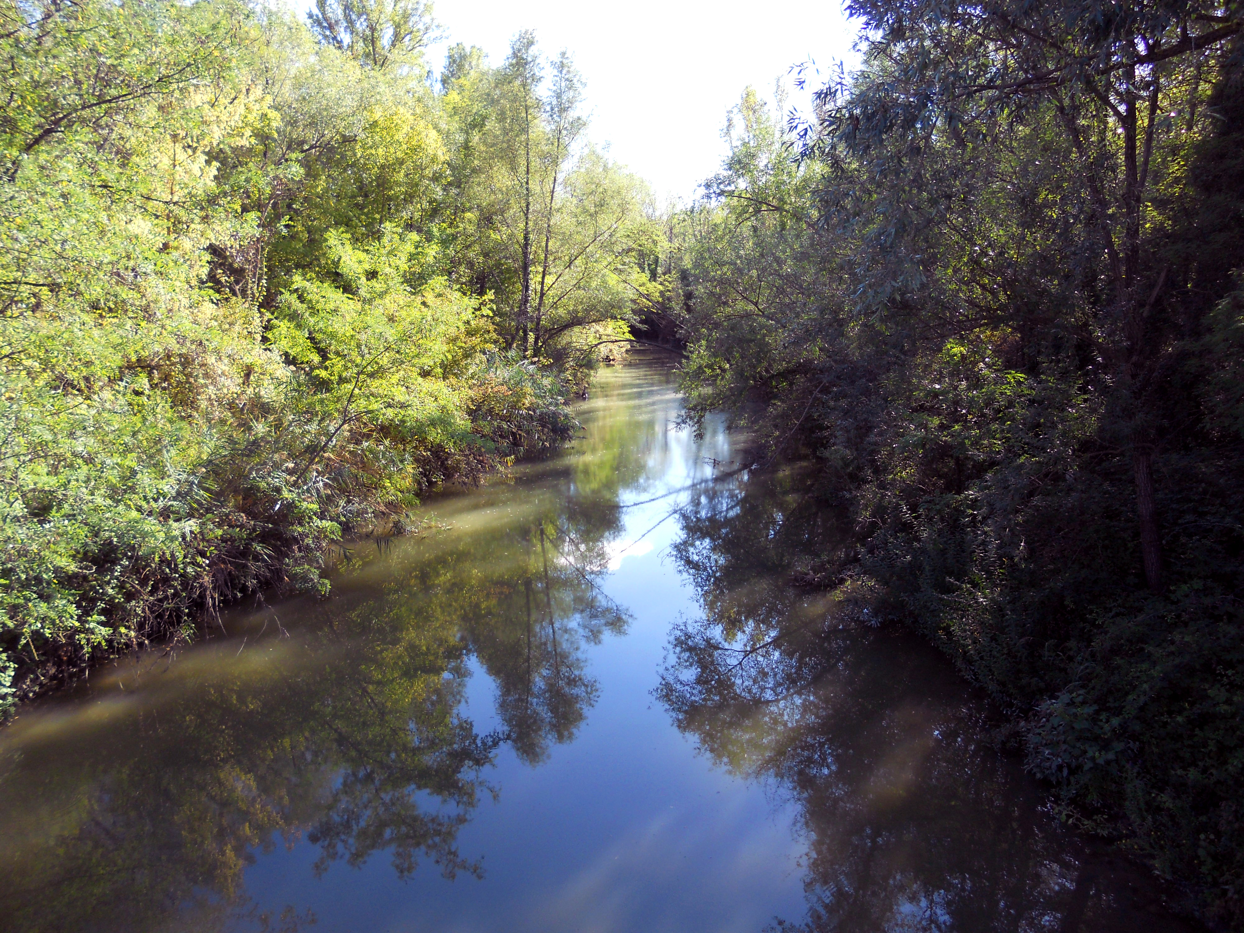 Oasi fluviale del Molino Grande This is a photo of a monument which is part of cultural heritage of Italy. The authorisation for taking photos of this object was provided by the World Wide Fund for Nature Italy.